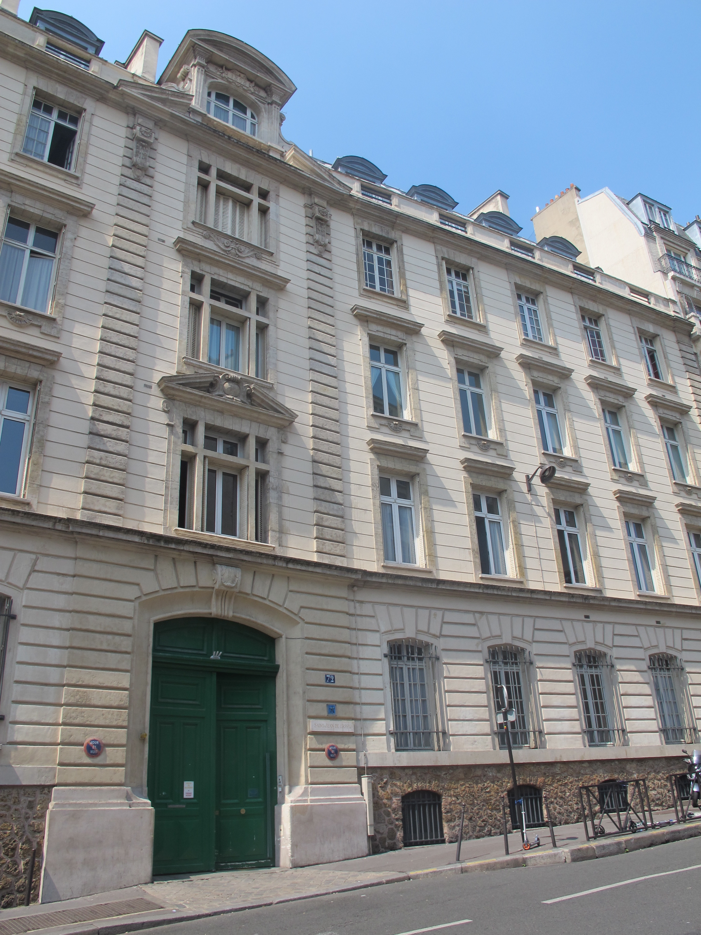 Façade du lycée Saint-Jean-de-Passy (Paris).